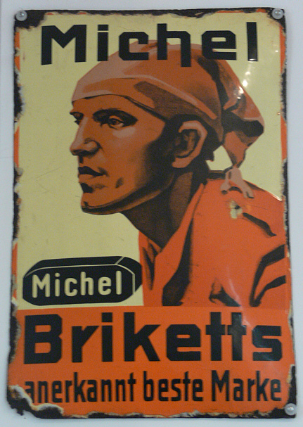 Emailleschild (Außenwerbung) für Briketts der Marke "Michel", frühes 20. Jh. (English translation, Briketts: known as the best brand) Landesmuseum Württemberg (Außenstelle Museum für Volkskultur in Württemberg, Waldenbuch)